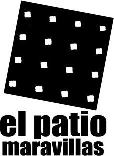 El Patio Maravillas es un Espacio Polivalente Autogestionado situado en el barrio Malasaña, en Madrid.